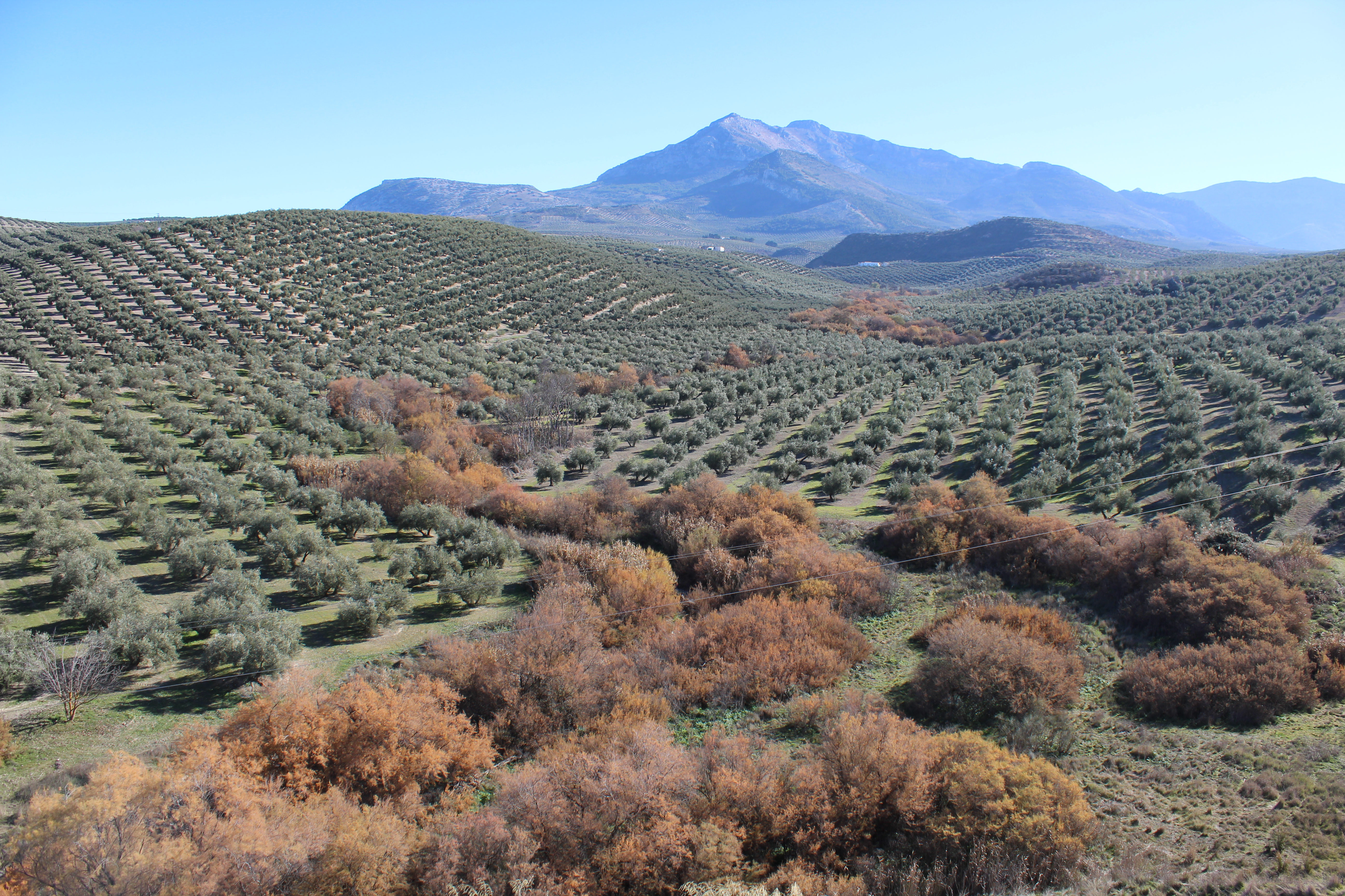 Vista del río Torres y del monte Aznaitín, desde Recena.